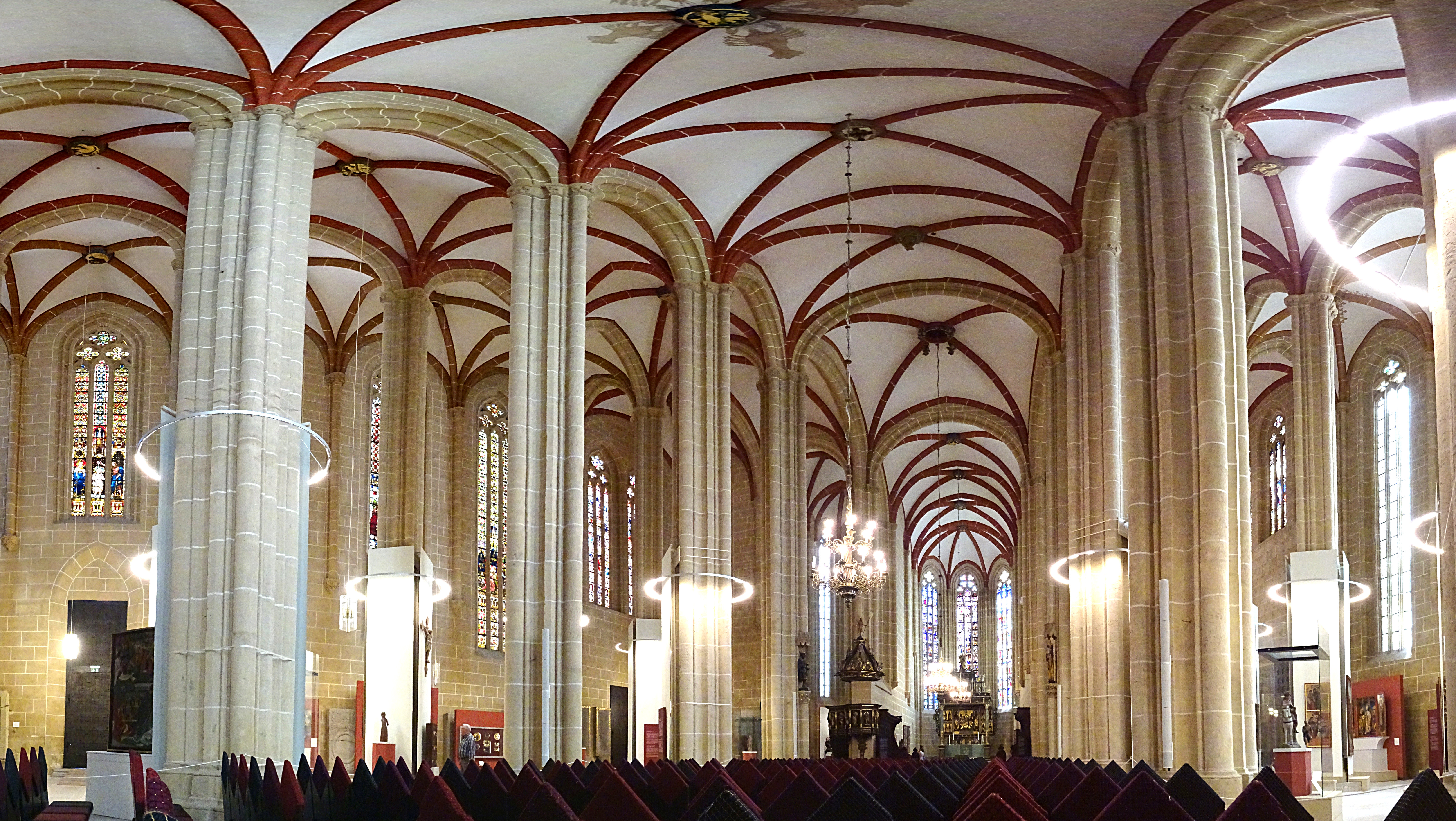 Innenraum Panorama der Marienkirche (Mühlhausen), seit 1975 Museum, seit 2018 zeigt eine Sonderausstellung die Weimarer Sammlung mittelalterlicher Kunstwerke aus Thüringen.